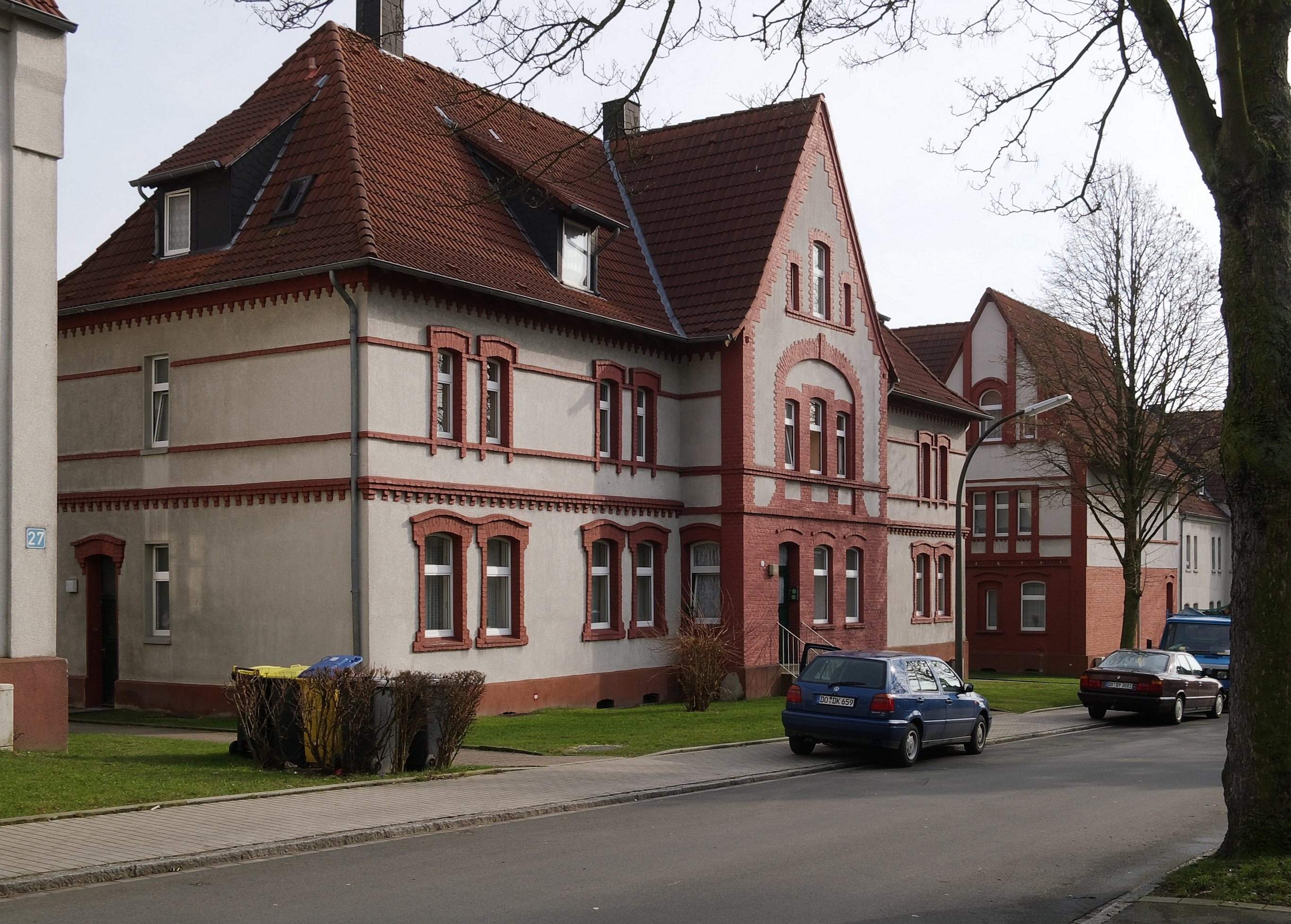 Eins der größeren Mehrfamilienhäuser in der Alten Kolonie Eving, Dortmund, Nordrhein-Westfalen. Ps: Danke für den netten Plausch in der ersten Frühlingssonne :-)